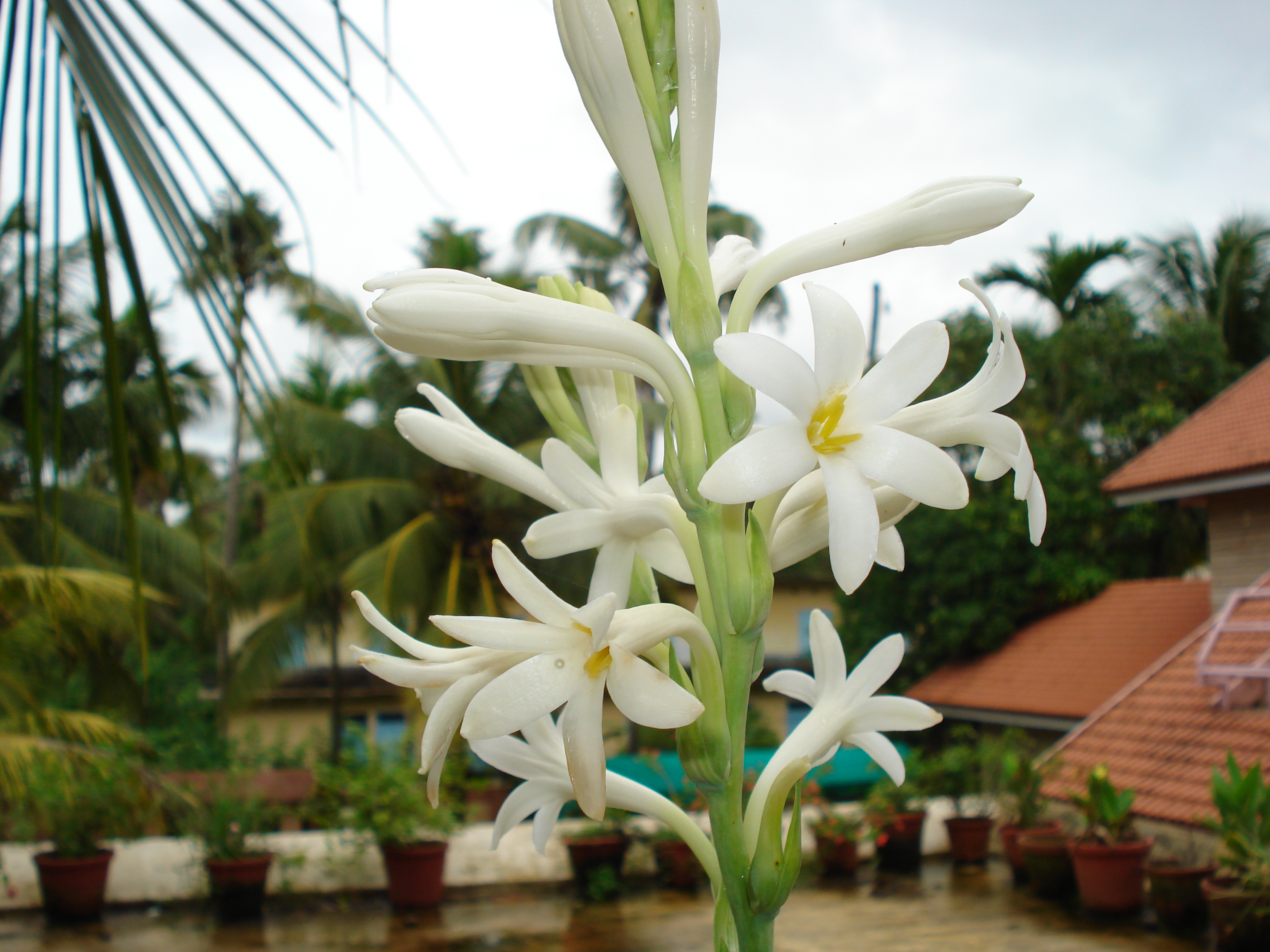 കദംബം